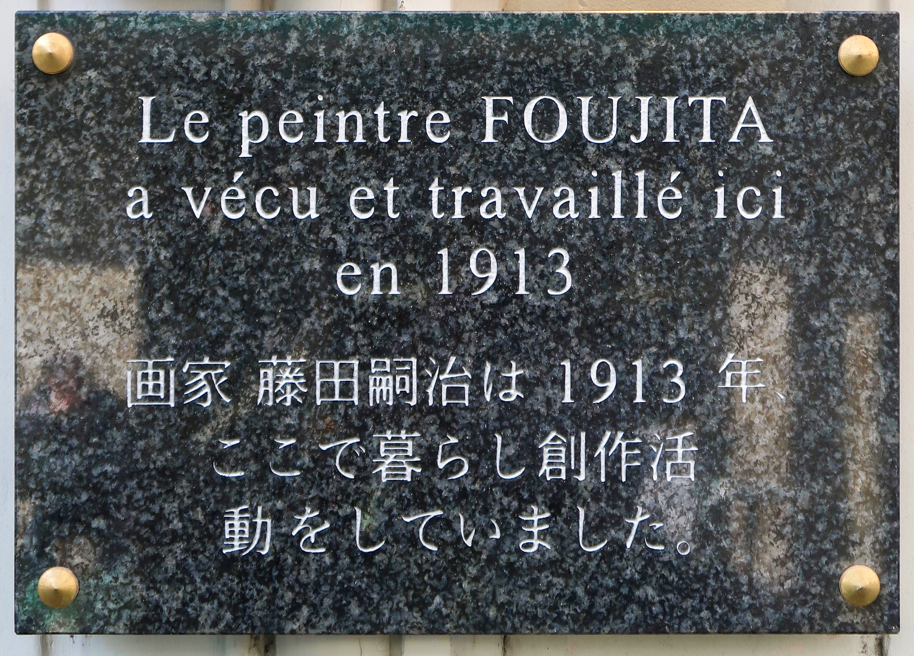 Plaque en hommage à Foujita, 28 rue d'Odessa (Paris, 14e).